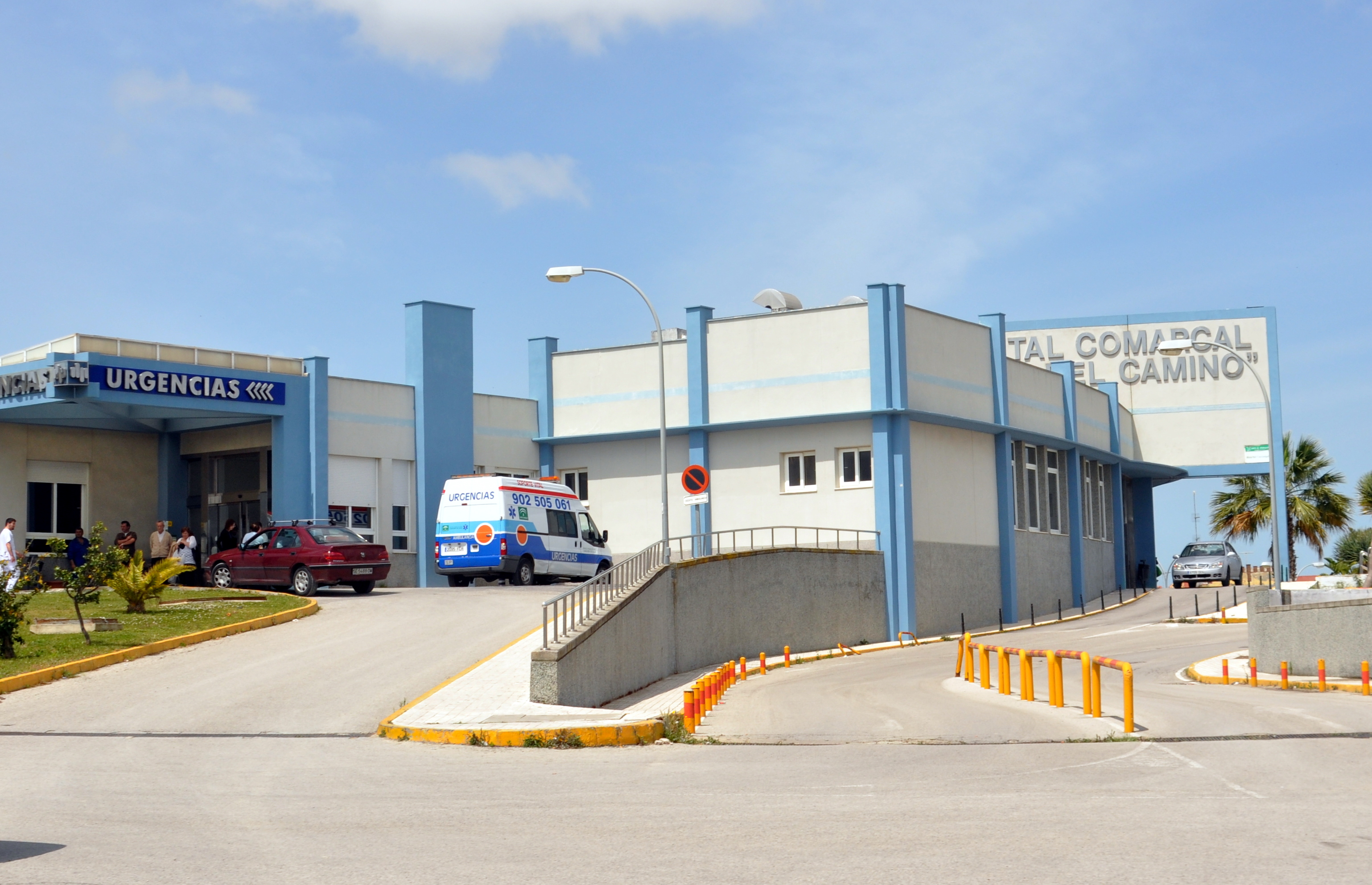 Hospital comarcal "Virgen del Camino". Sanlúcar de Barrameda (provincia de Cádiz, España).